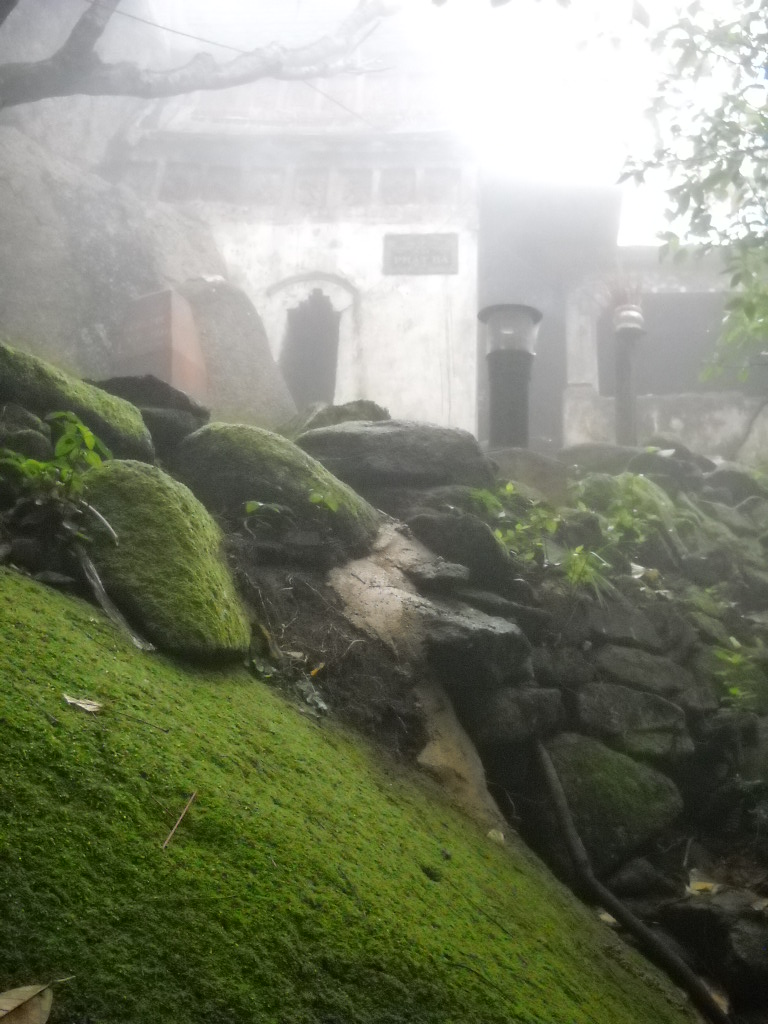 Am Phật Bà, chùa Hương Tích, Hà Tĩnh